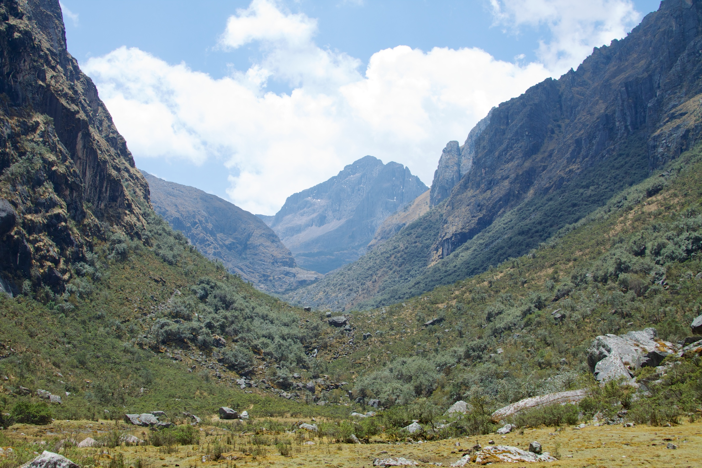 Peru - Trekking from Urubamba 018